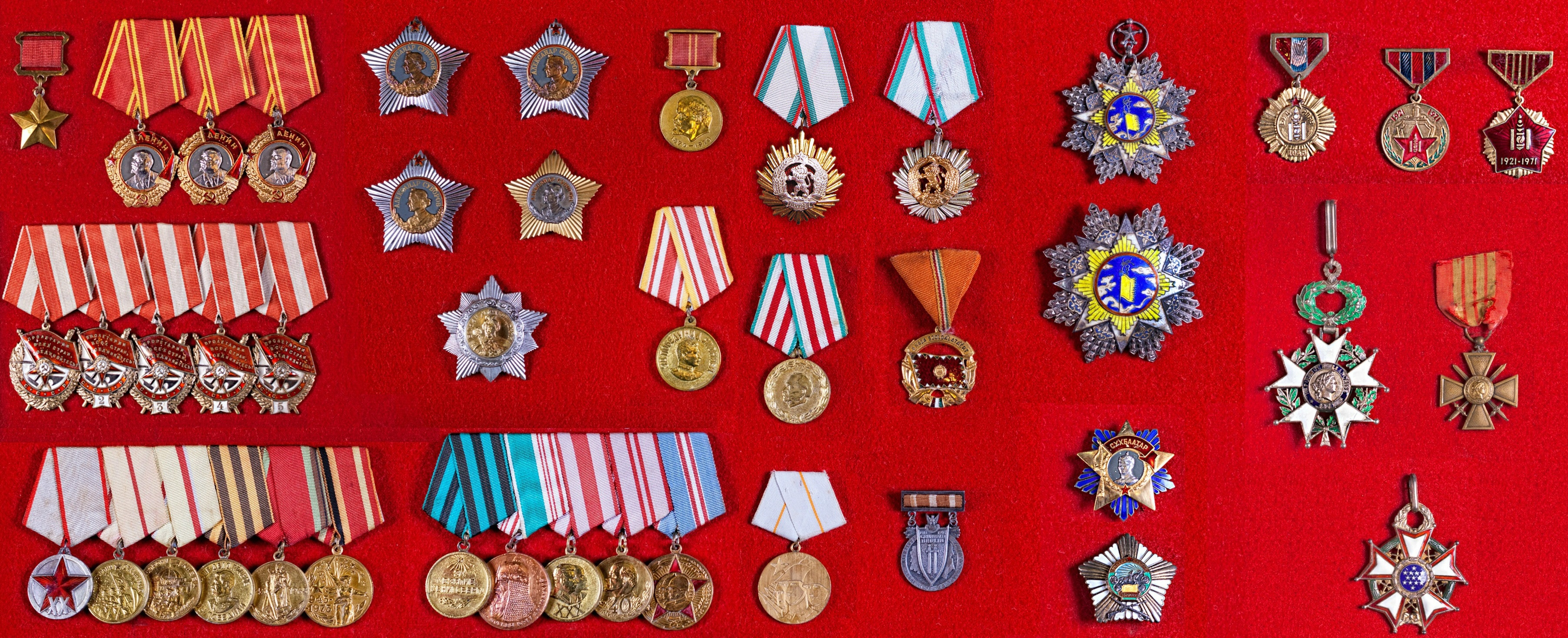 Ордена и медали Героя Советского Союза генерал-полковникаИ.И.Людникова